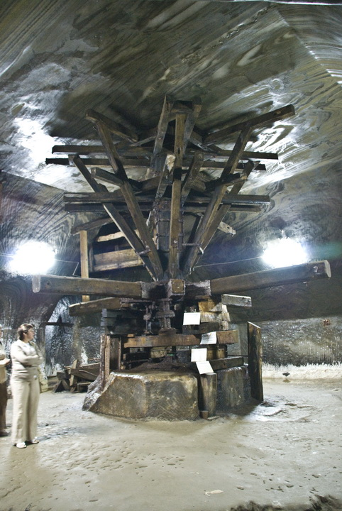 Salina Turda, crivacul minei Rudolf (unica instalaţie de acest gen păstrată în Europa).